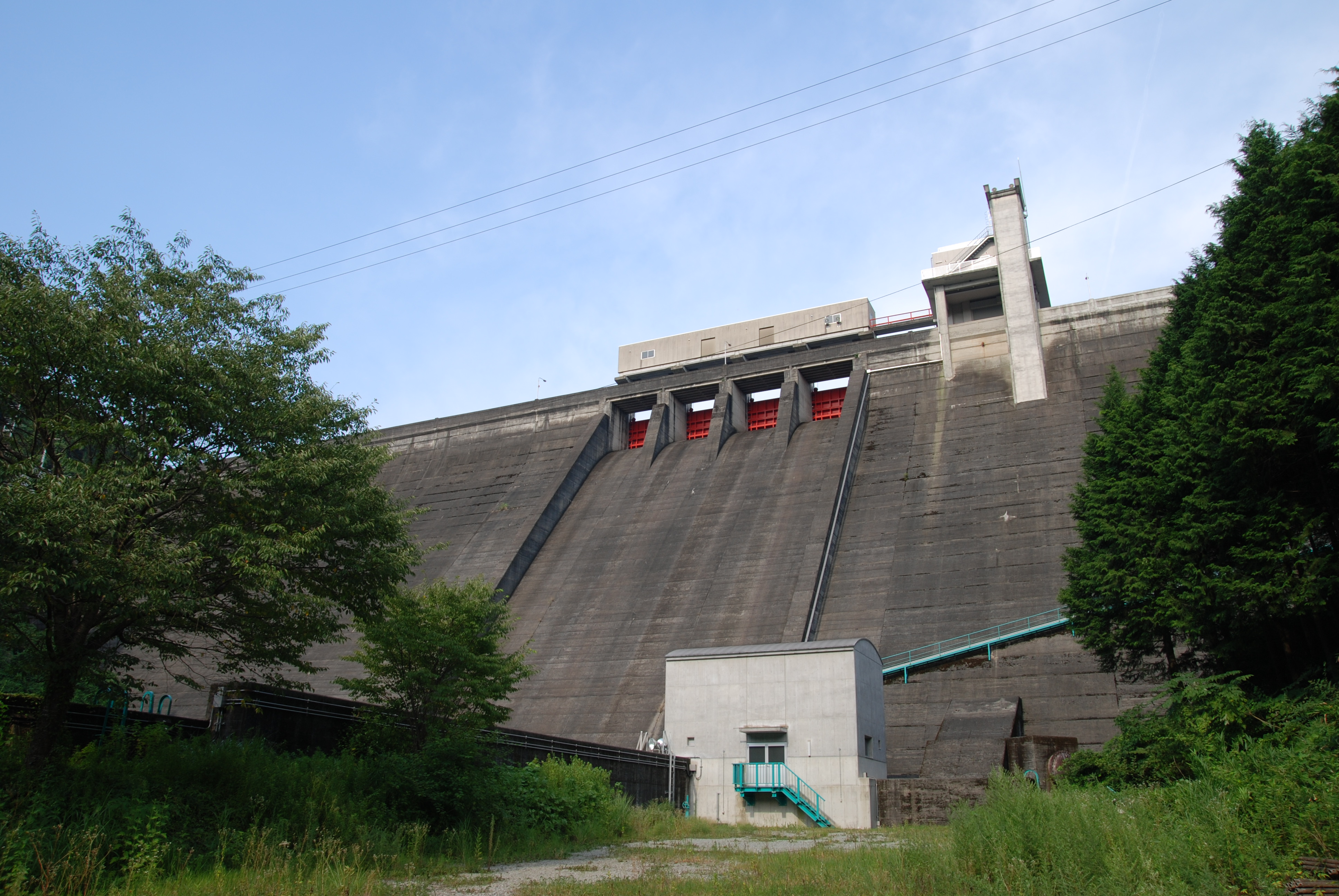 奈良県、津風呂ダムのダムサイト。